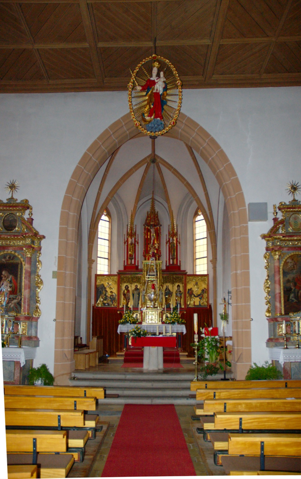 St. Nikolauskirche Mitteleschenbach